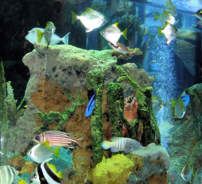 Fishes in Aquarium